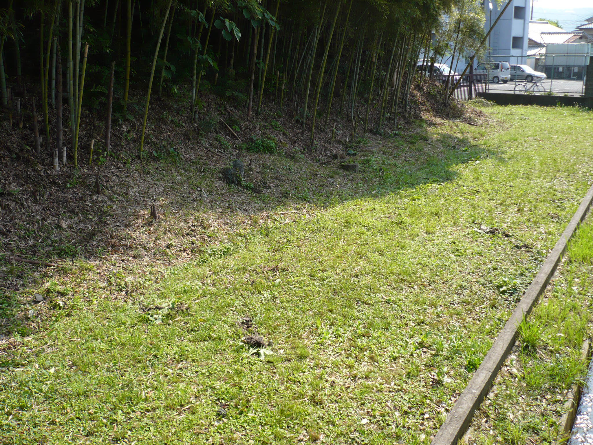 東側にある土塁跡